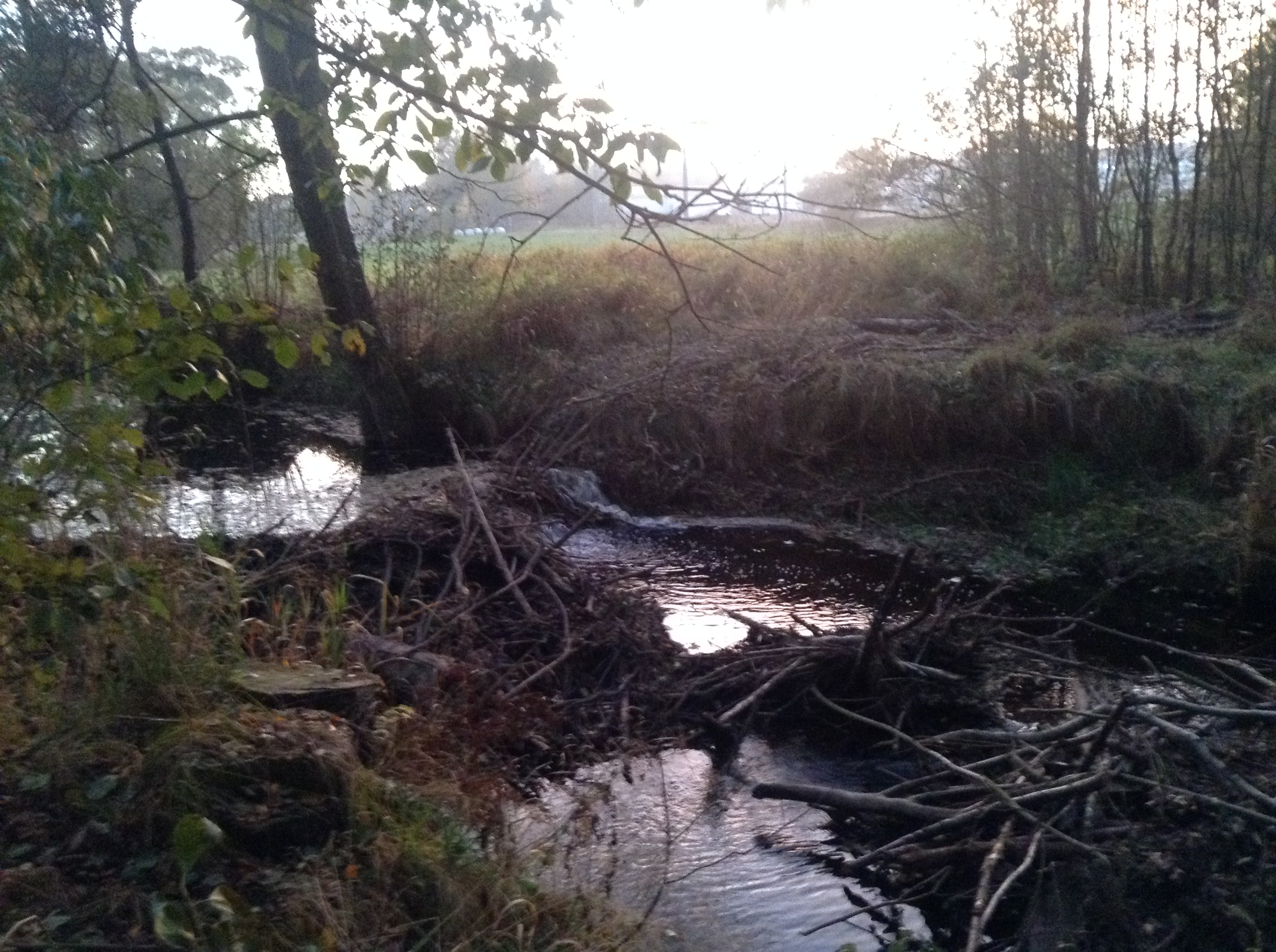 Die Kössein mit einem kleinen Biberdamm zwischen Waldershof und Marktredwitz